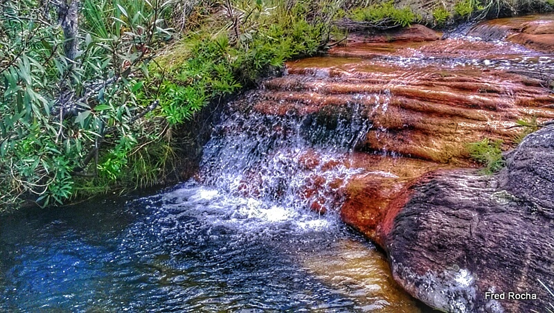 Essa é uma das muitas cachoeiras do Parque do Biribiri